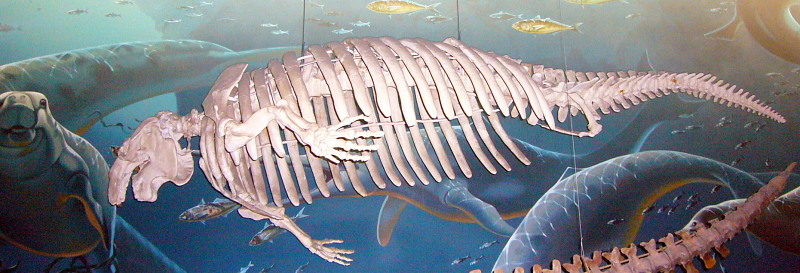 Metaxytherium floridanum skeleton